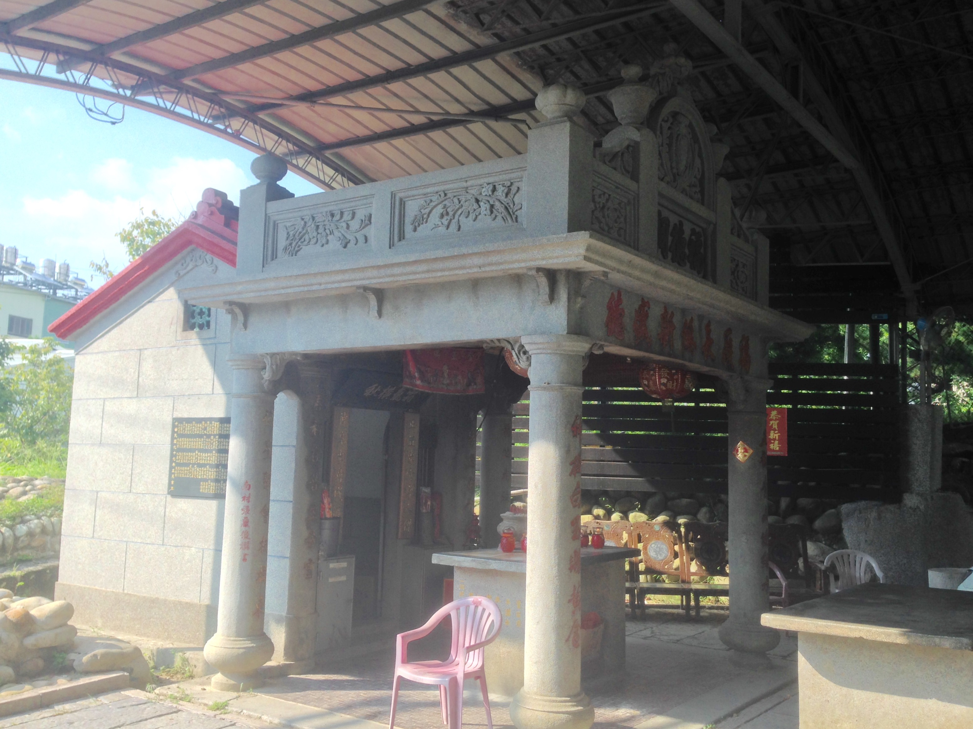 中文（台灣）: 後山腳福德祠